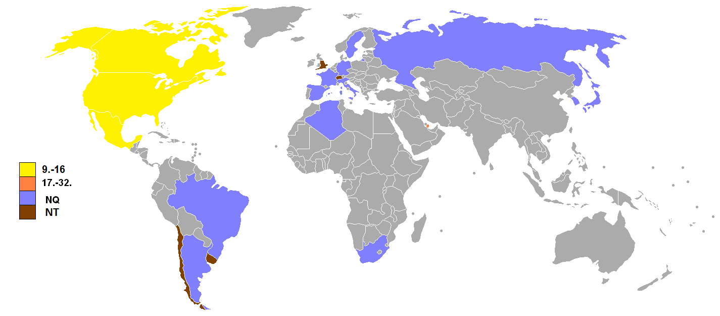 Beste Platzierungen der kanadischen Mannschaft in den Austragungsländern der FIFA-Fußballweltmeisterschaften